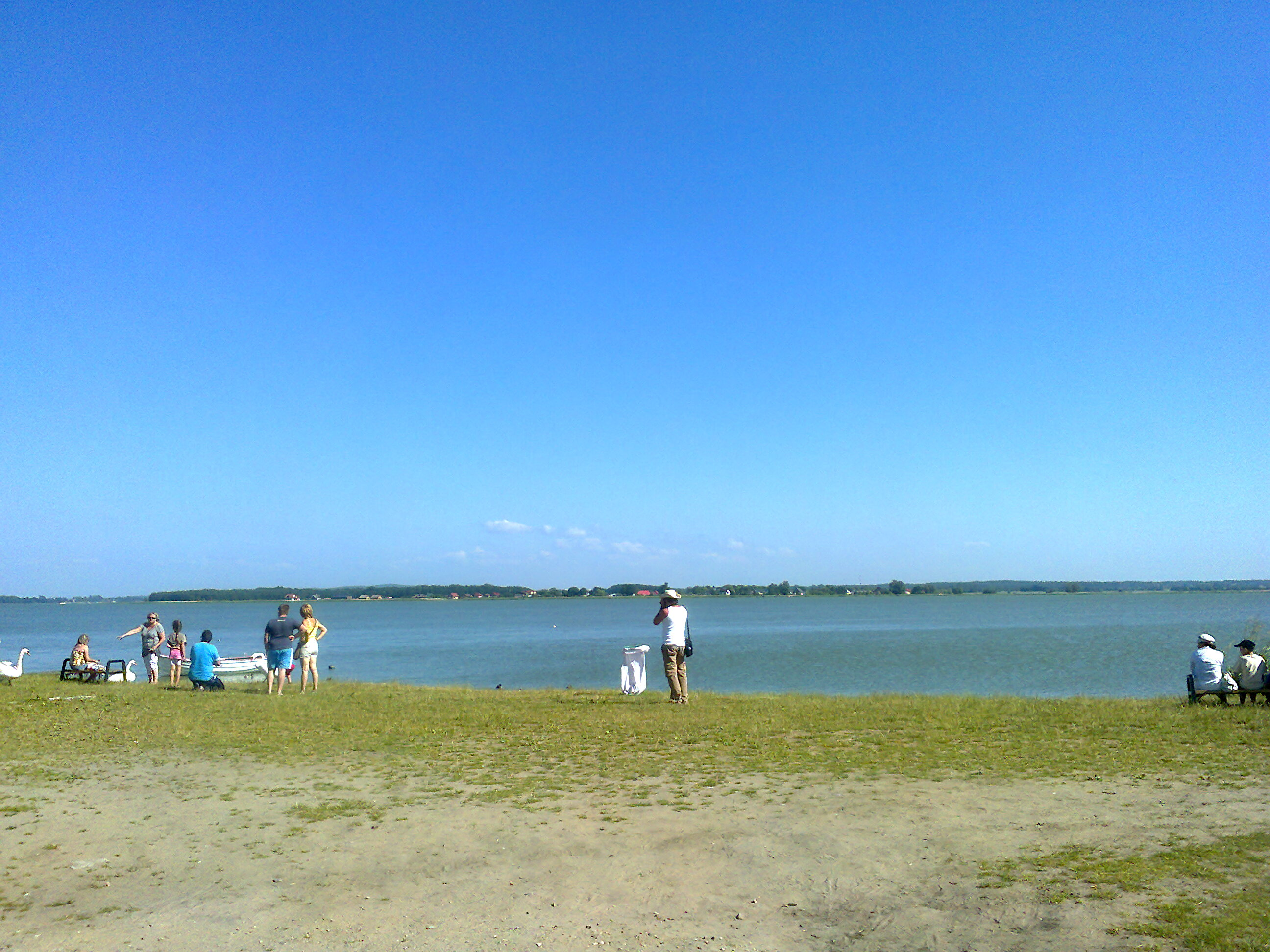 Jamunder See